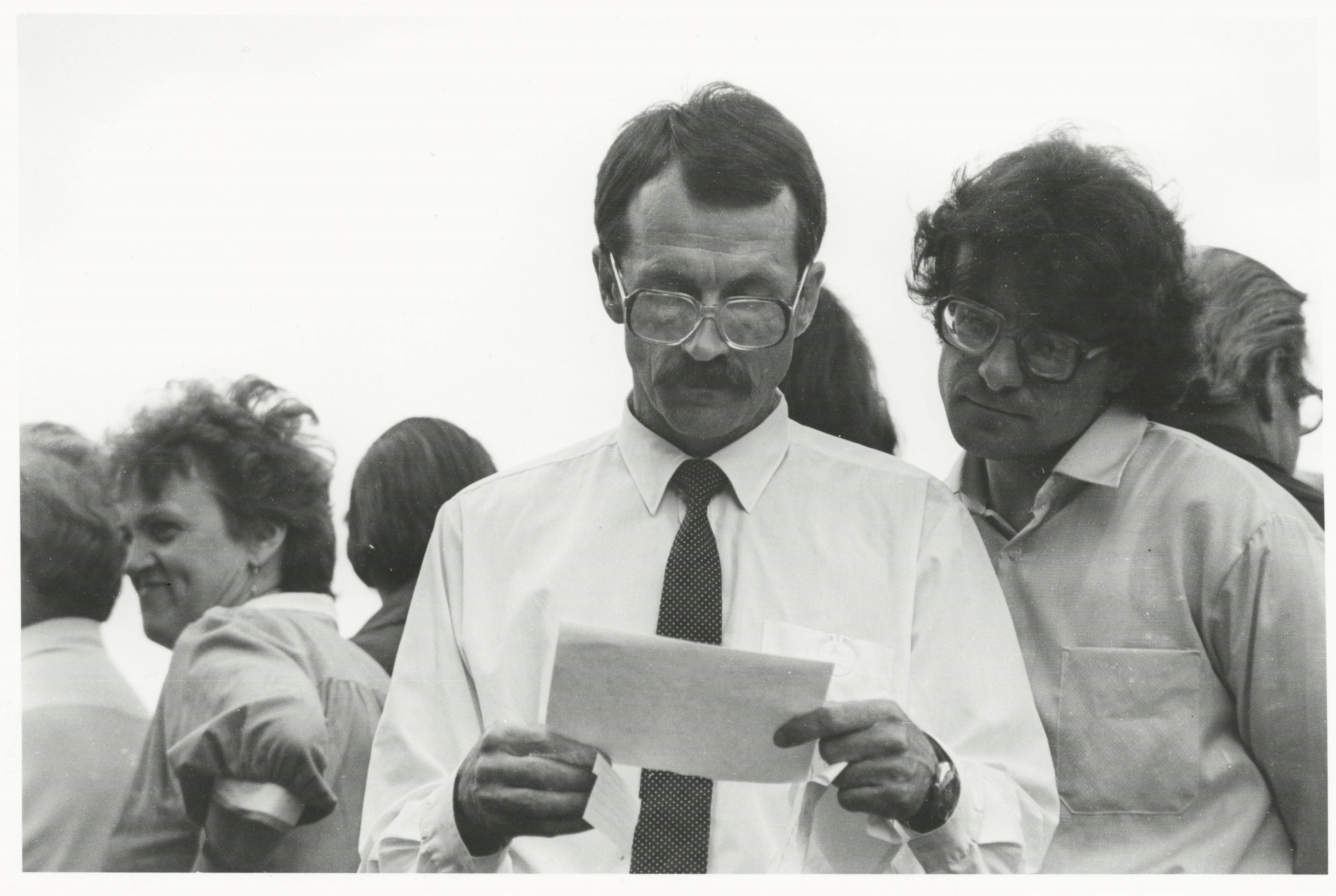 Su mokytoju R. Ozolu.